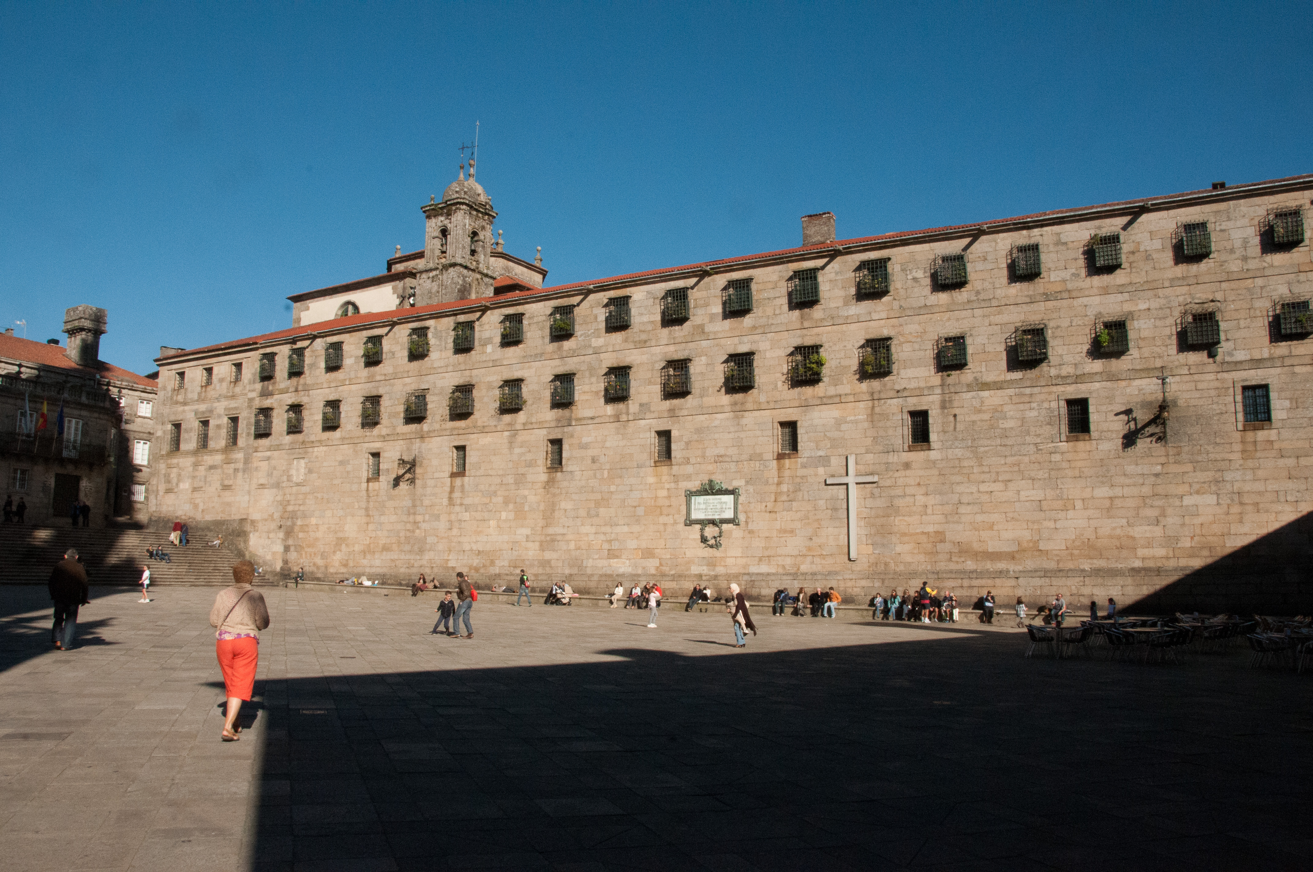 Santiago de Compostela, Spain-29